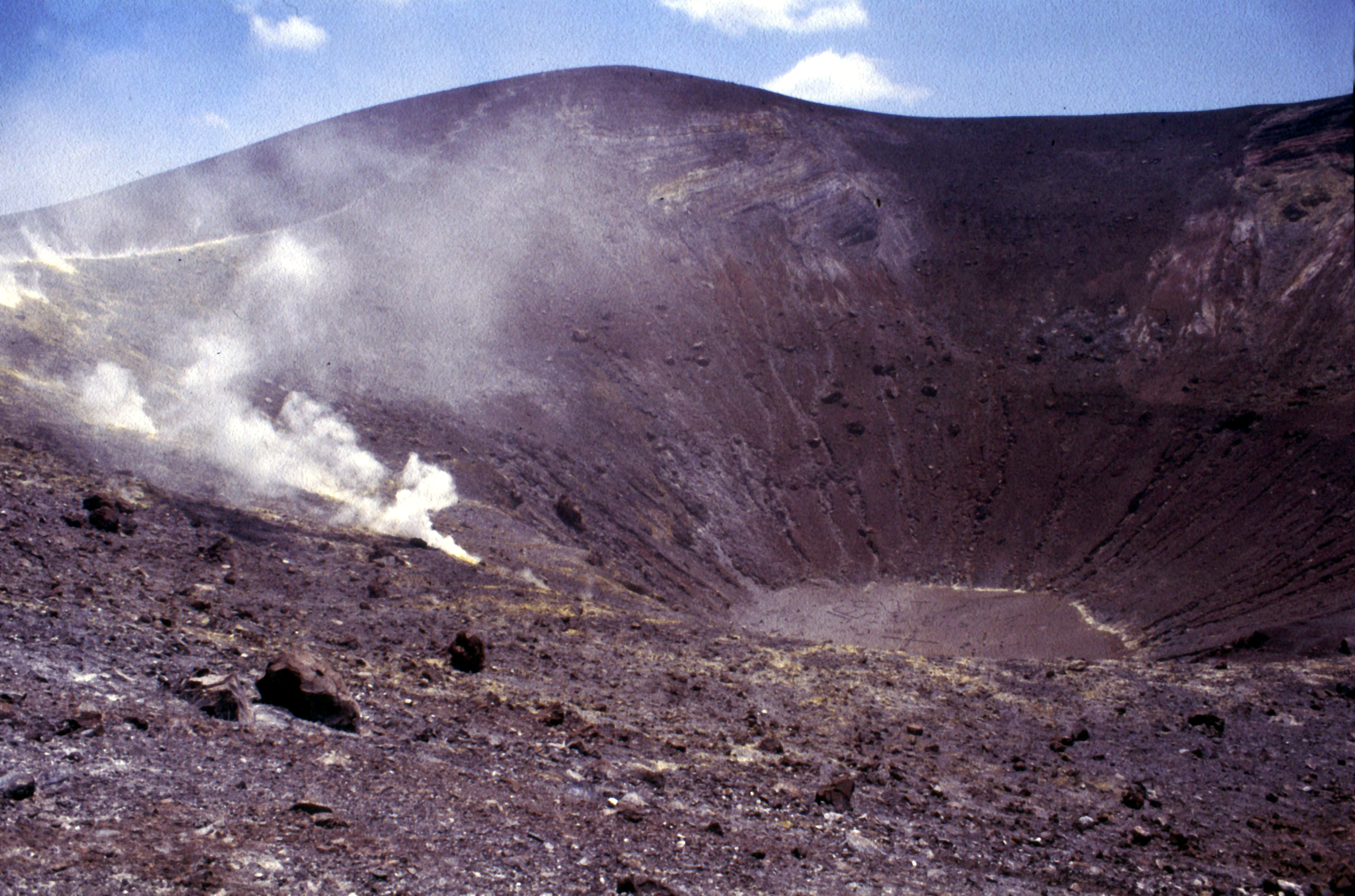 Insel Vulcano an der Nordküste Siziliens